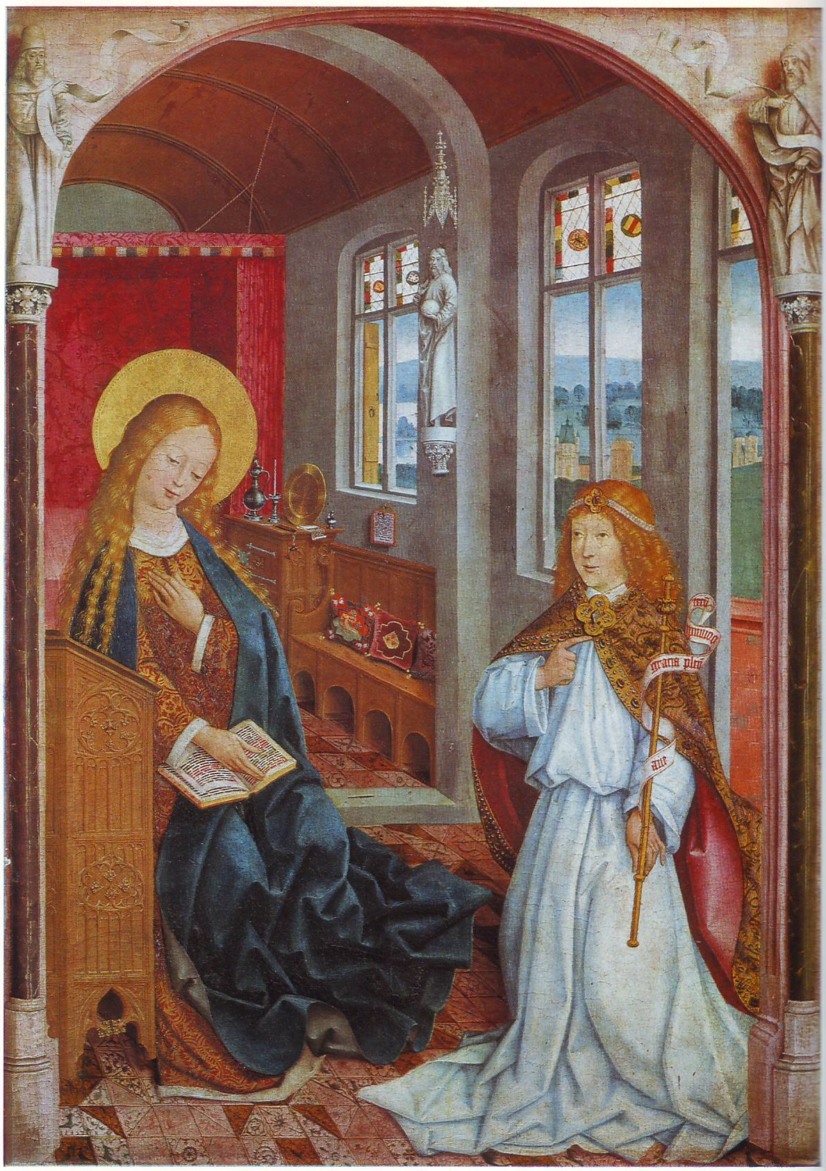 Verkündigung, Liesborner Altar, Natinal Gallery London